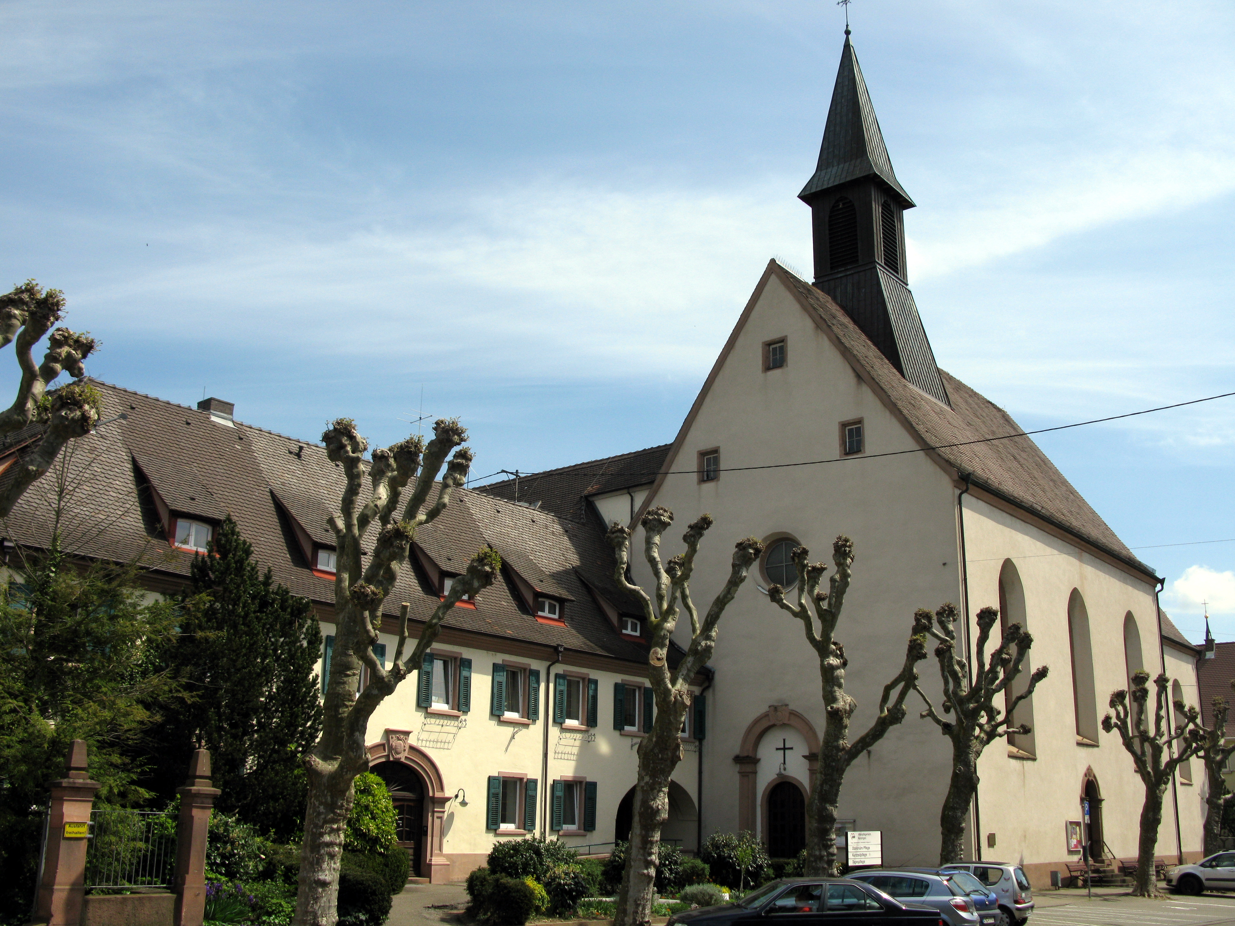 Ehemaliges Franziskanerkloster (heute Altenpflegeheim) mit ev. Kirche in Kenzingen